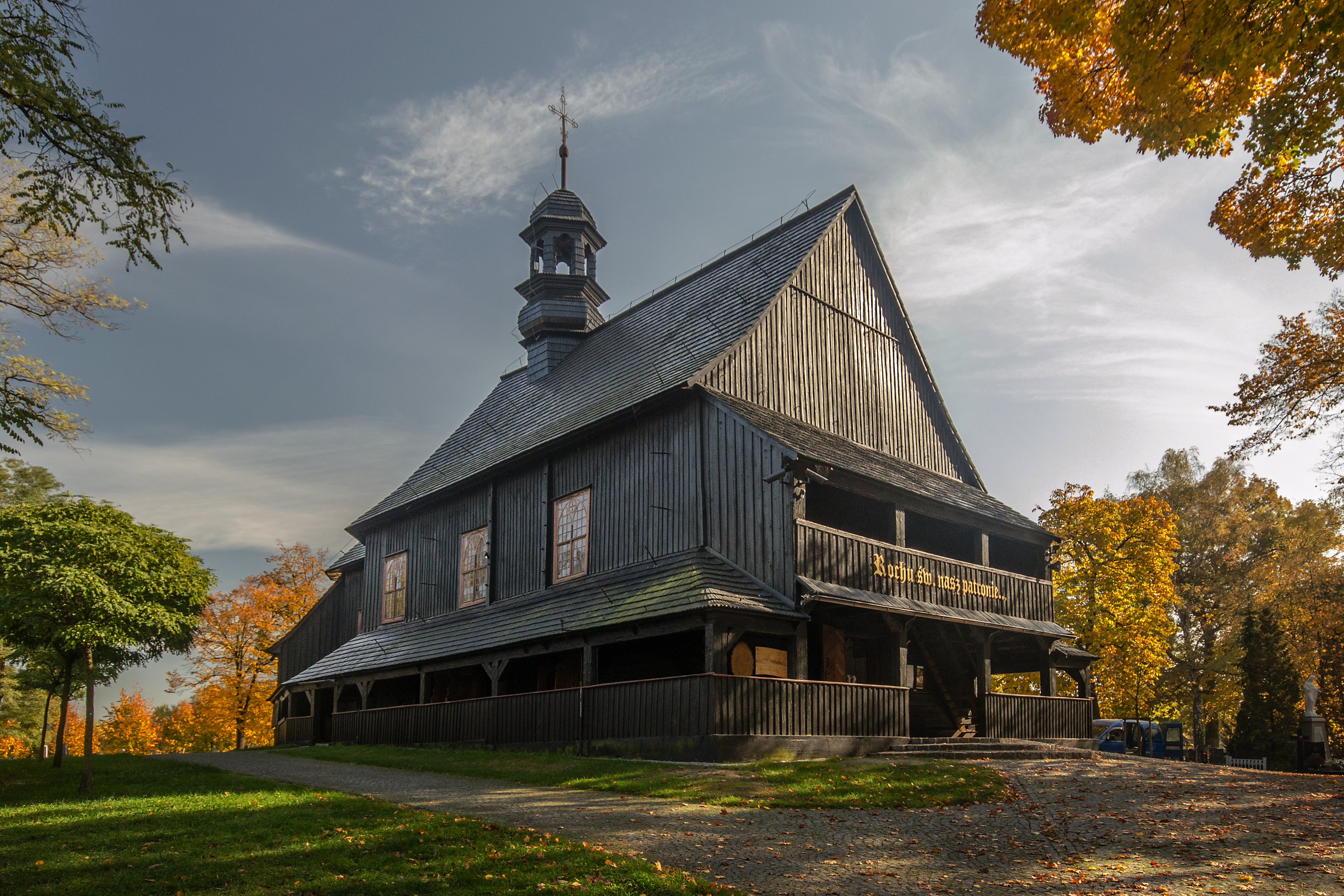 Dobrzeń Wielki, kościół odpustowy p.w. św. Rocha, 1658, 1752, 1928, 1958